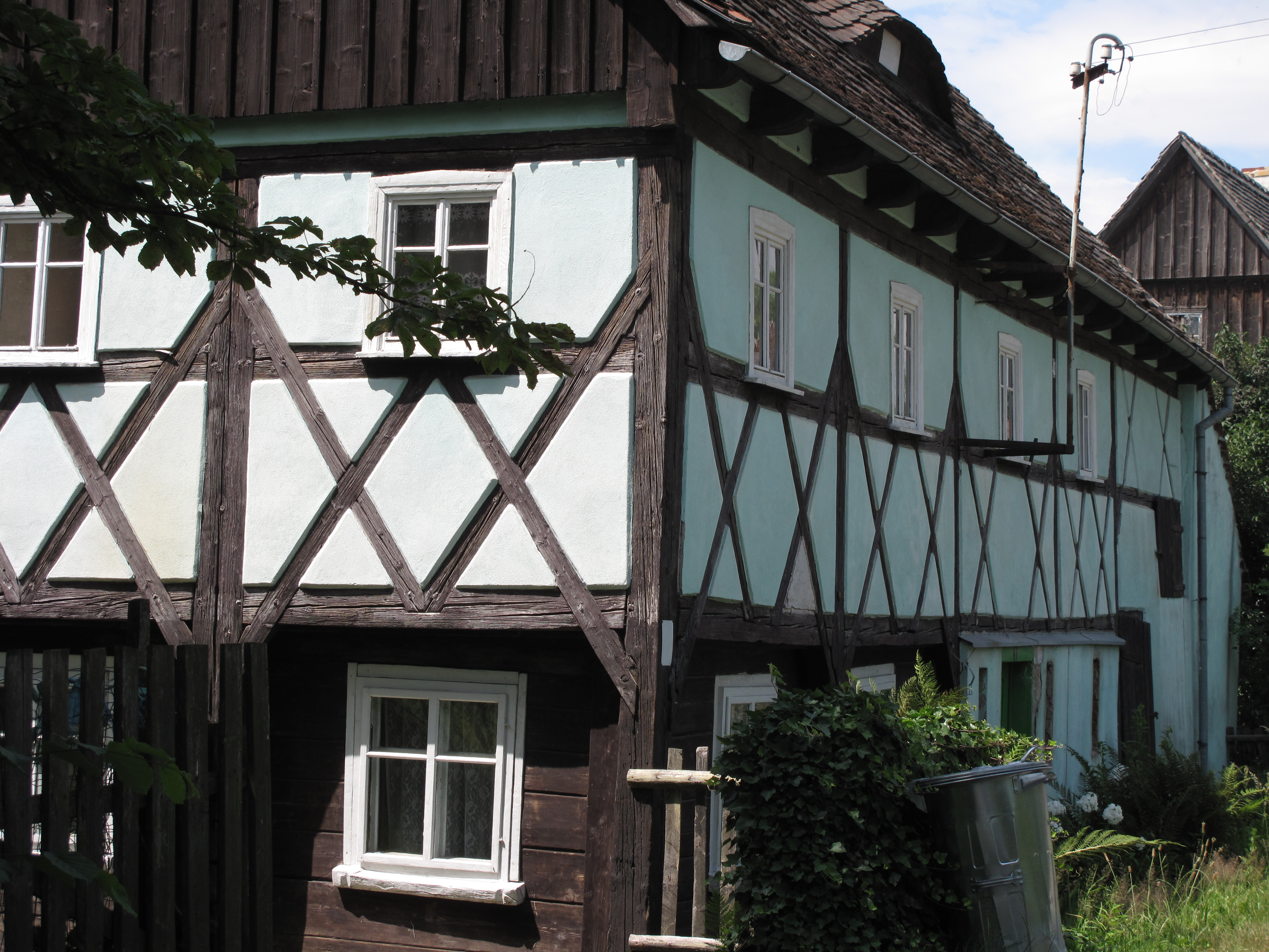 Wyszków (województwo dolnośląskie). Polska.